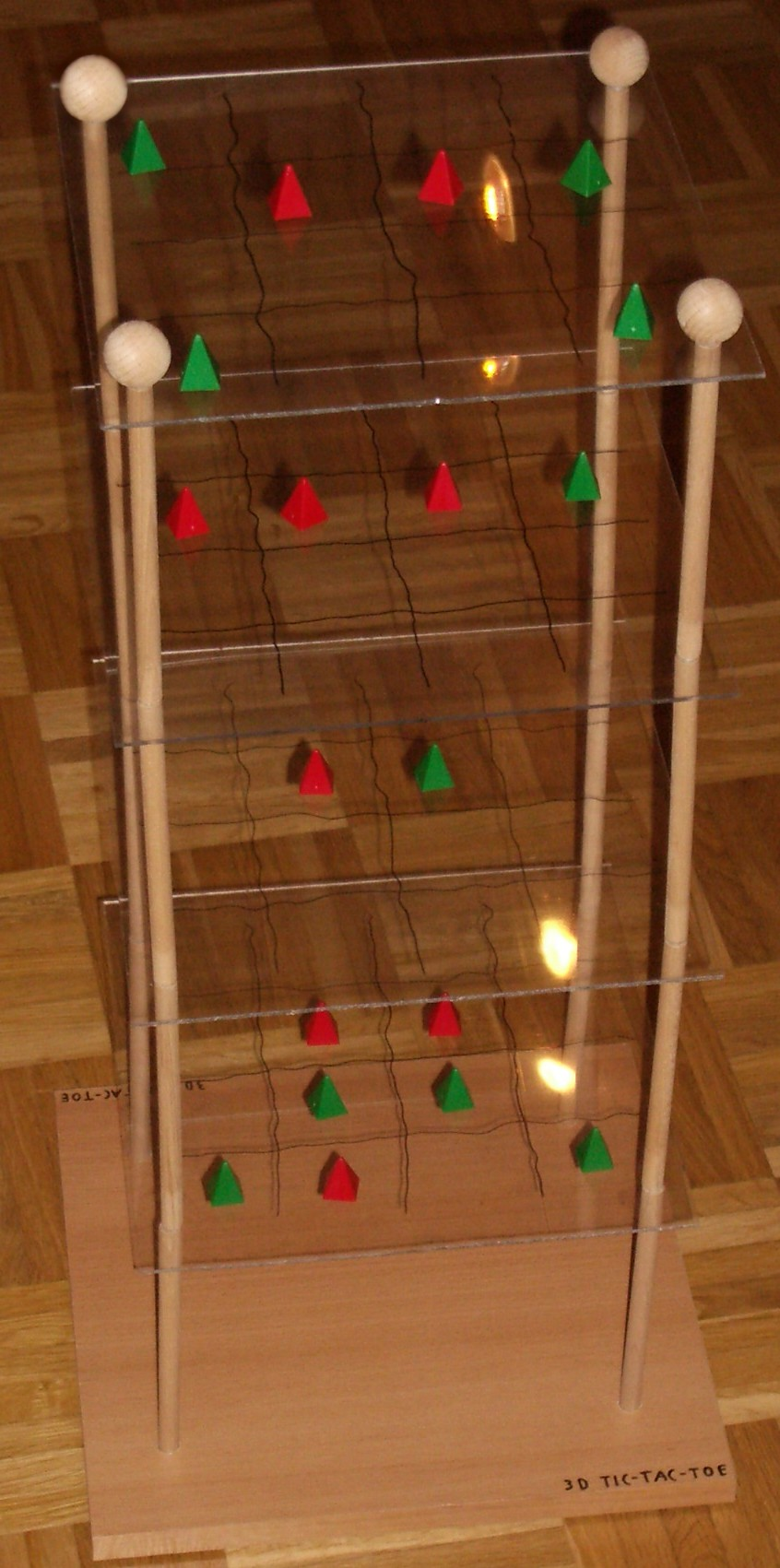 Selbstgebasteltes 3D Tic Tac Toe